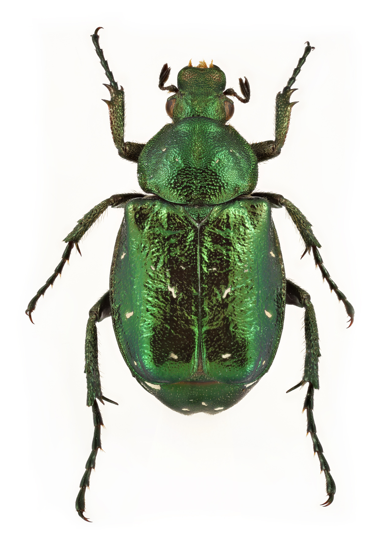 Gnorimus nobilis, female